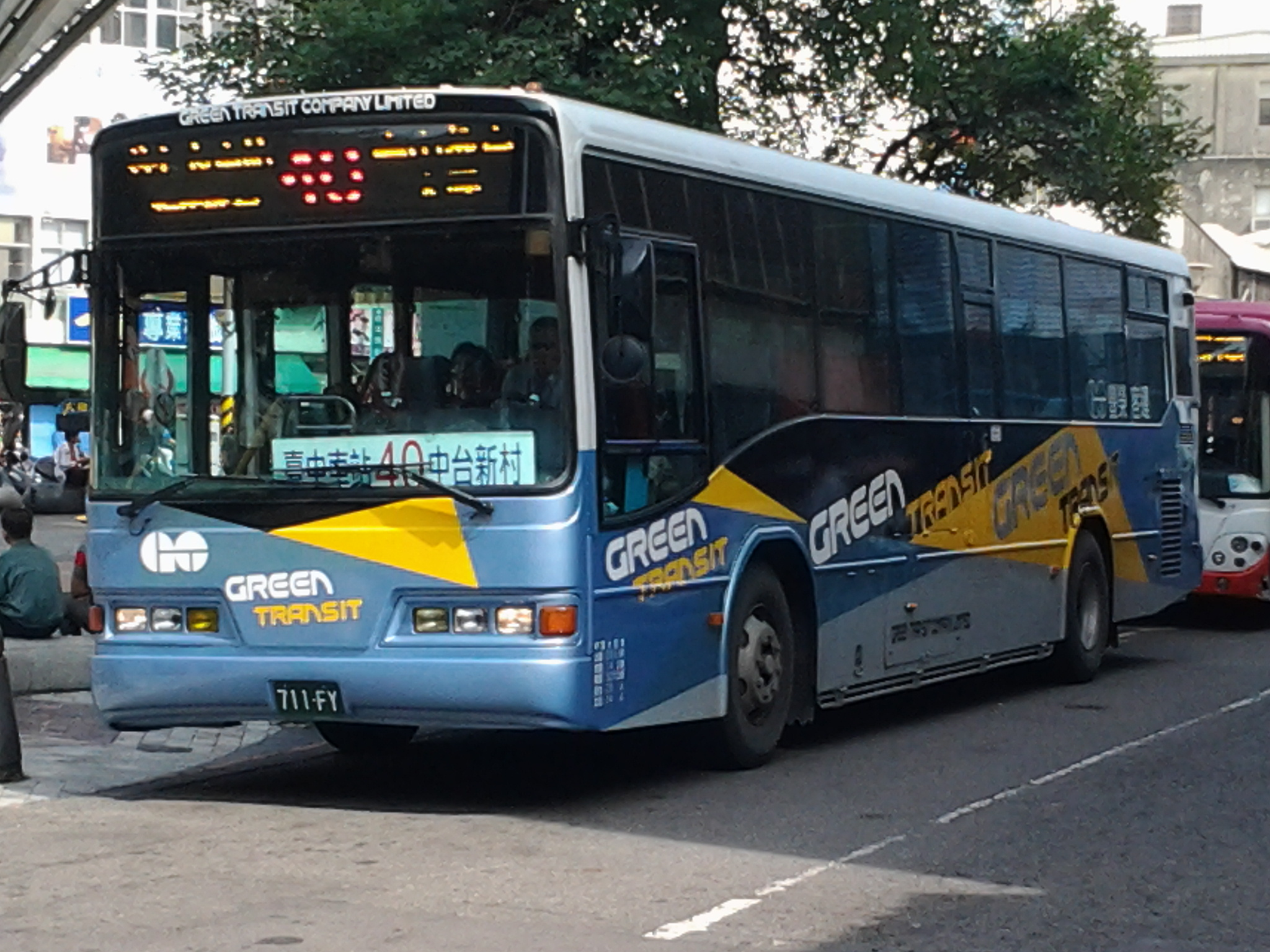 豐榮客運711-FY營運台中市公車40路